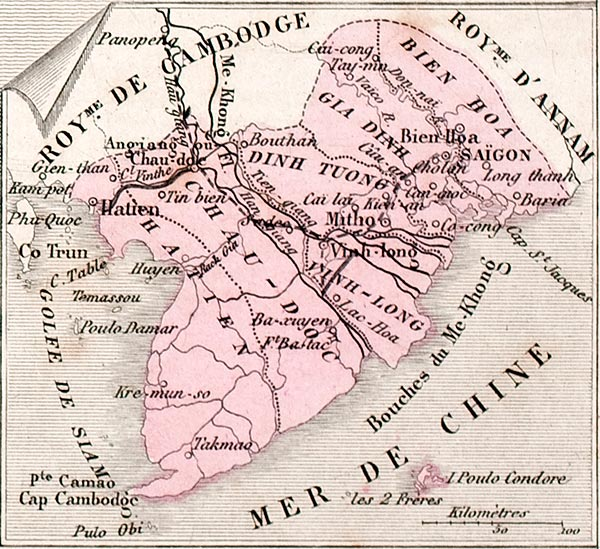 Bản đồ Nam Kỳ Lục Tỉnh (BasseCochinchine) giai đoạn (1841-1862) thời Thiệu Trị và Tự Đức, trước khi bị người Pháp xâm chiếm.